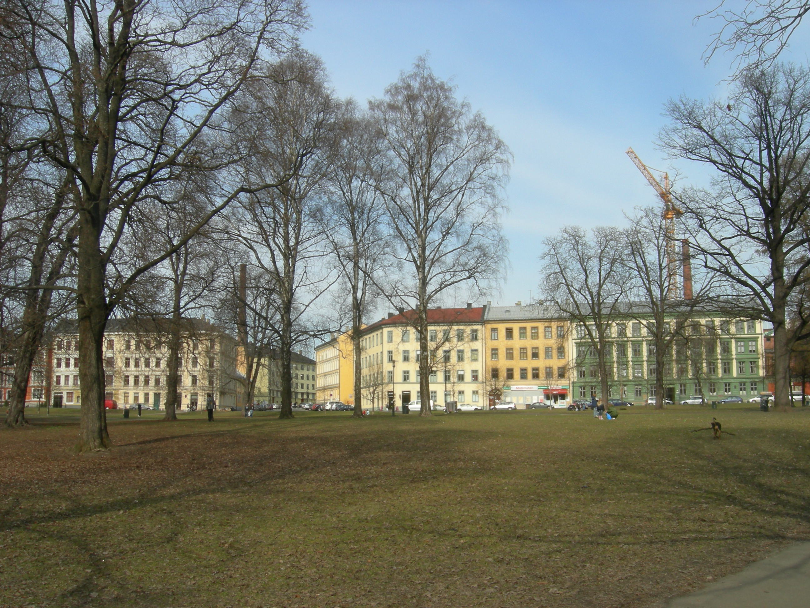 Sofienberg park, Oslo, Norway